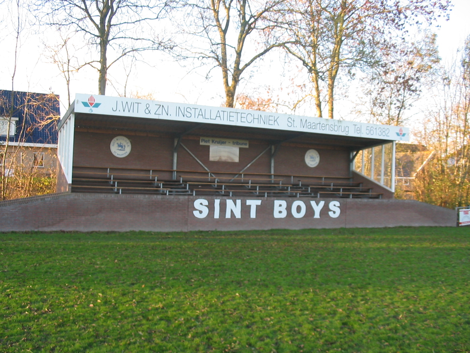 Tribune van amateurvoetbalclub SV Sint Boys, Sint Maarten, Noord-Holland